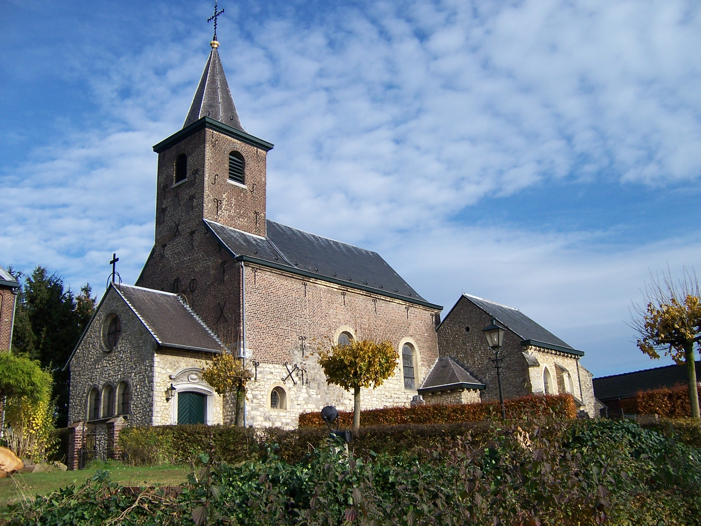 eigen foto van Kerk van WahlwillerChurch of Wahlwiller, Limberg, the Netherlands